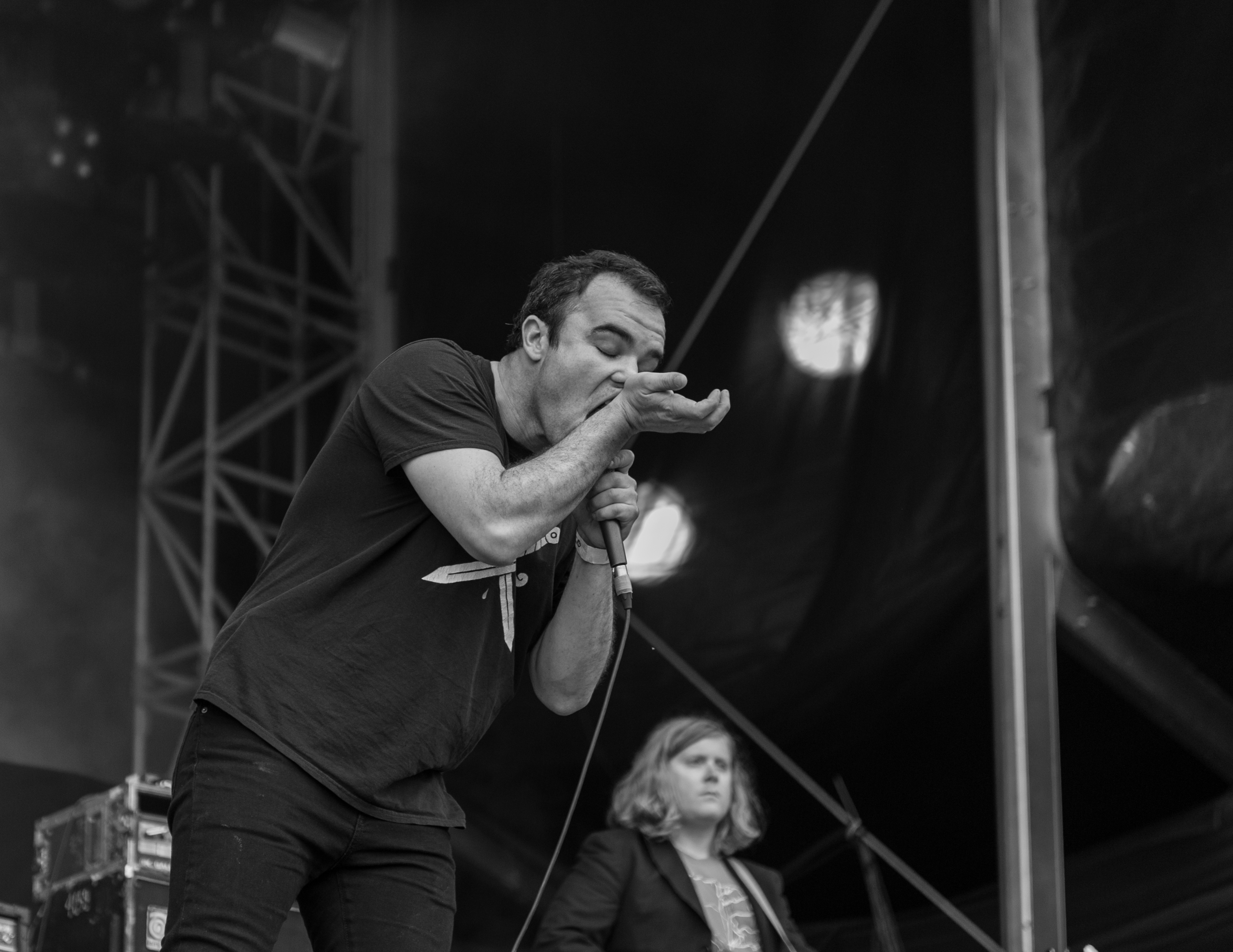 Die Band Future Islands auf dem Kosmonaut Festival 2015 in Chemnitz Oberrabenstein.